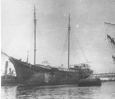 אוניית המעפילים יחיעם